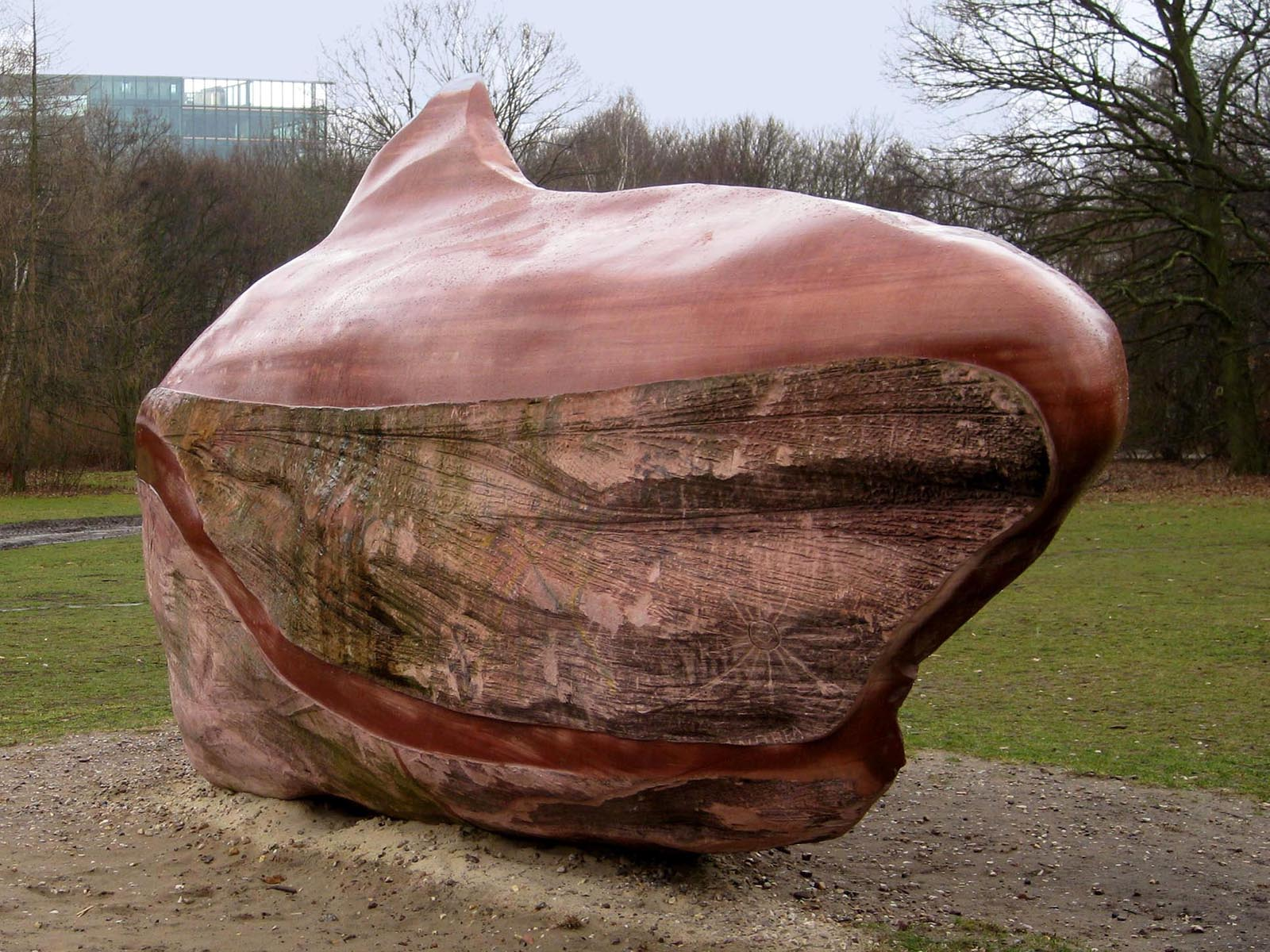 Global-Stone-Project, Stein aus Venezuela, 2007, Deutschland, Berlin-Tiergarten, zwischen der Straße des 17. Juni und der Ebertstraße